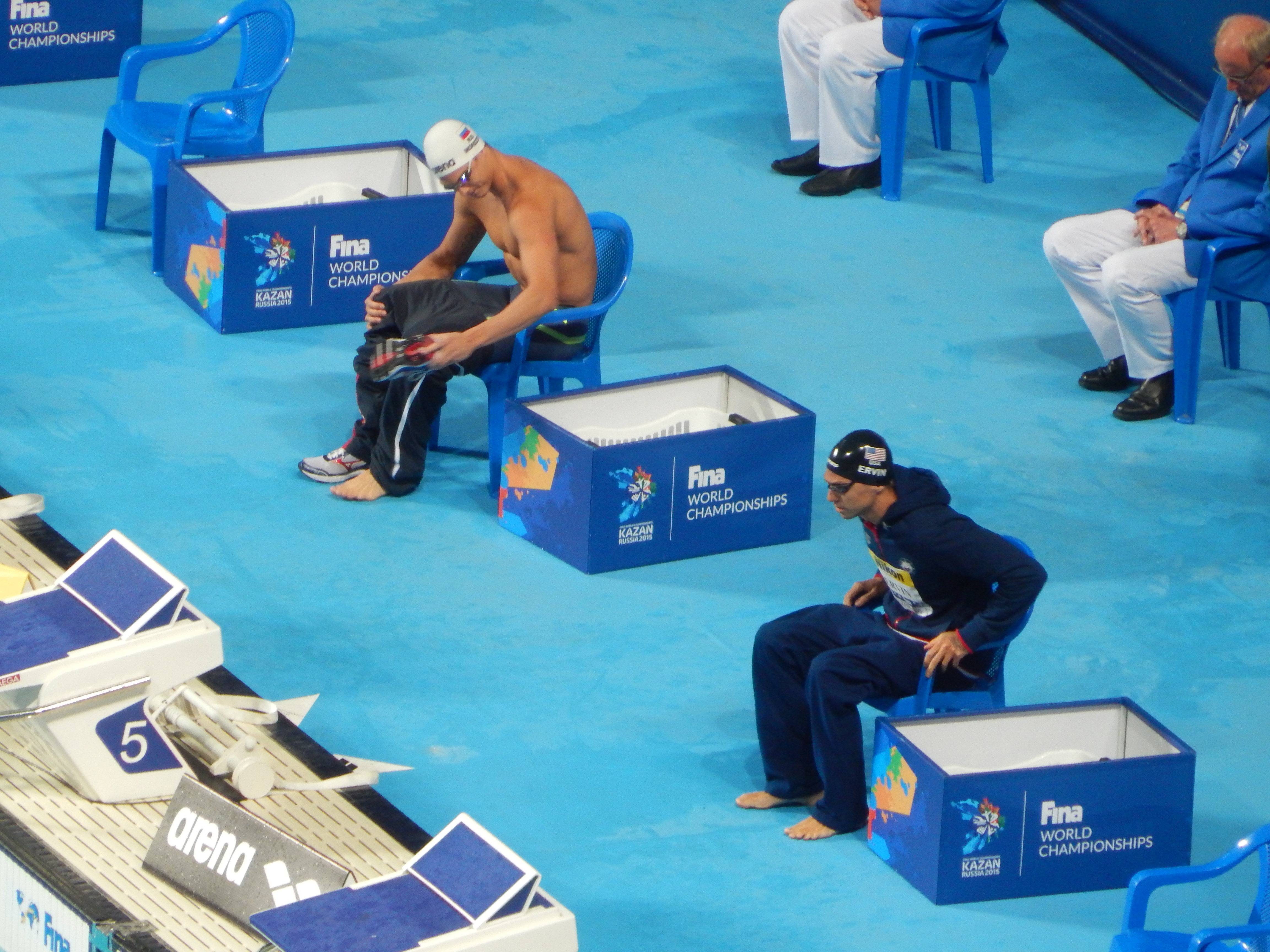 Морозов в Ирвин перед переплывкой на дистанции 50 метров в/с в Казани